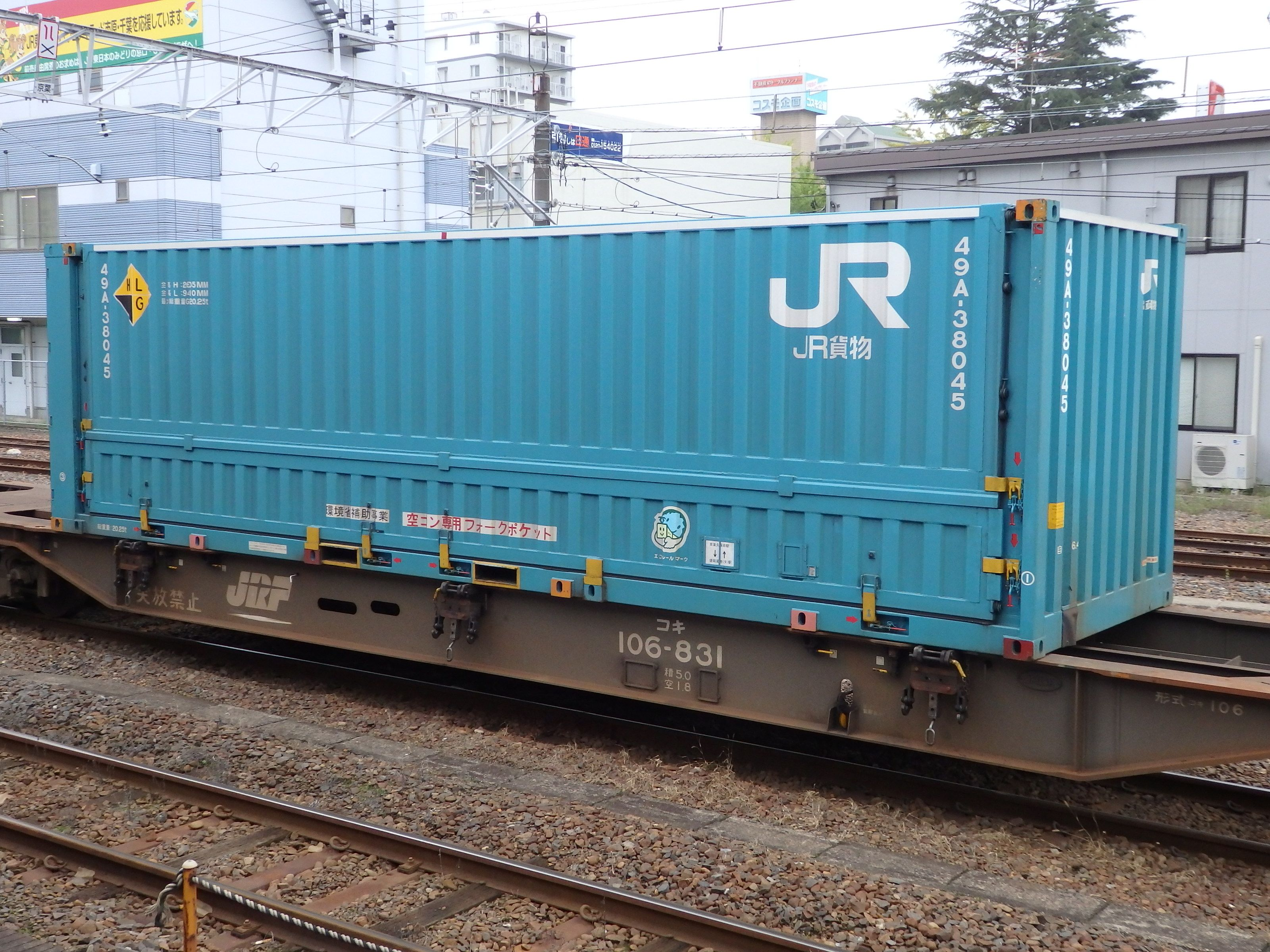 コキ106-831に積載された49A-38045 2017年9月7日 蘇我駅